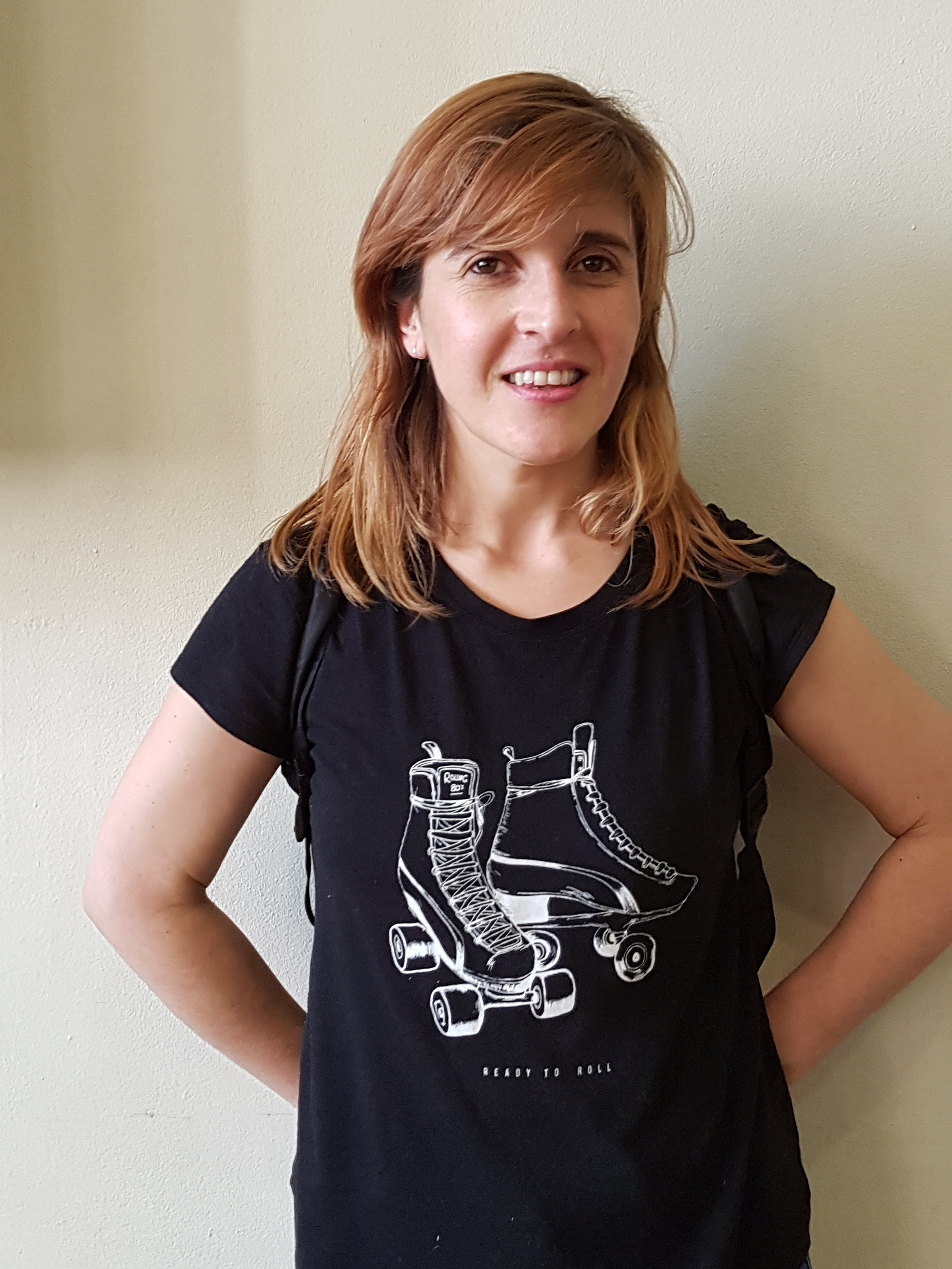 La escritora chilena Claudia Apablaza en la Feria Internacional del Libro de Santiago